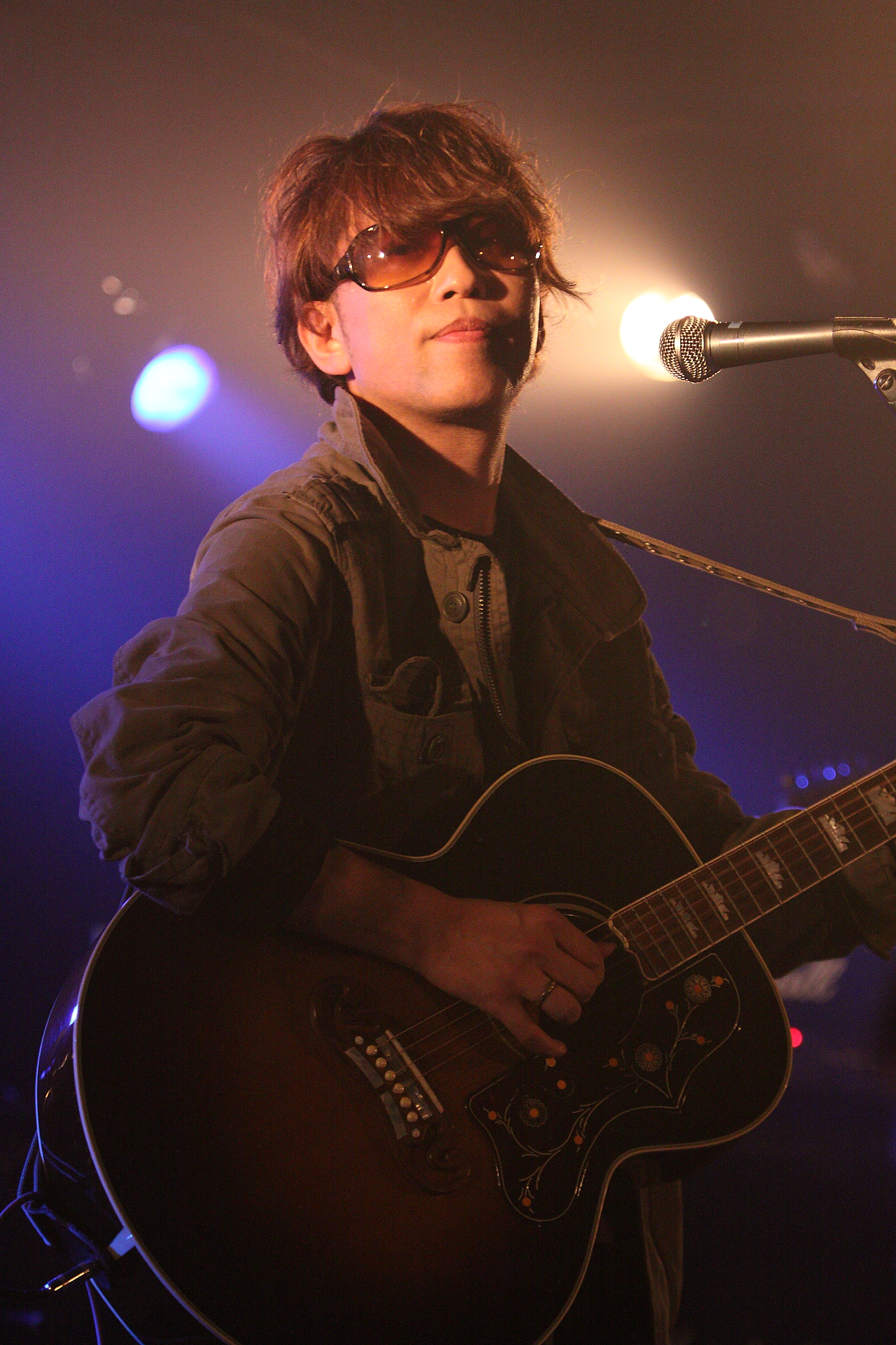 ロックバンドLORANのヴォーカルYASS